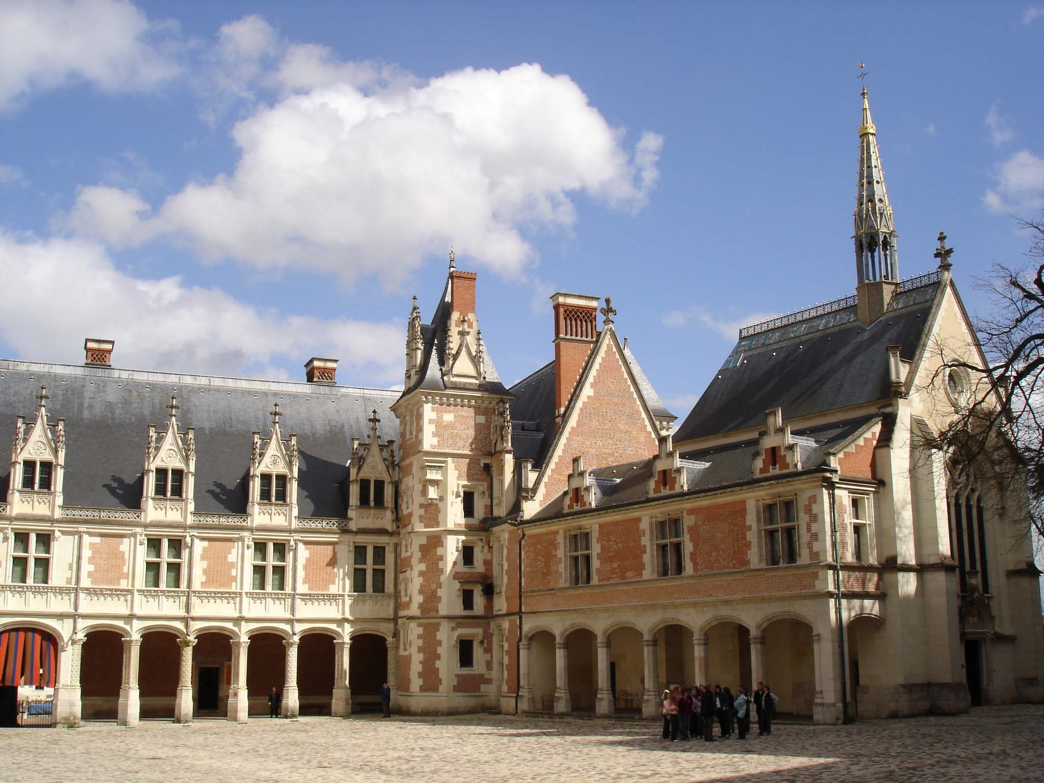 Château de Blois, Loire